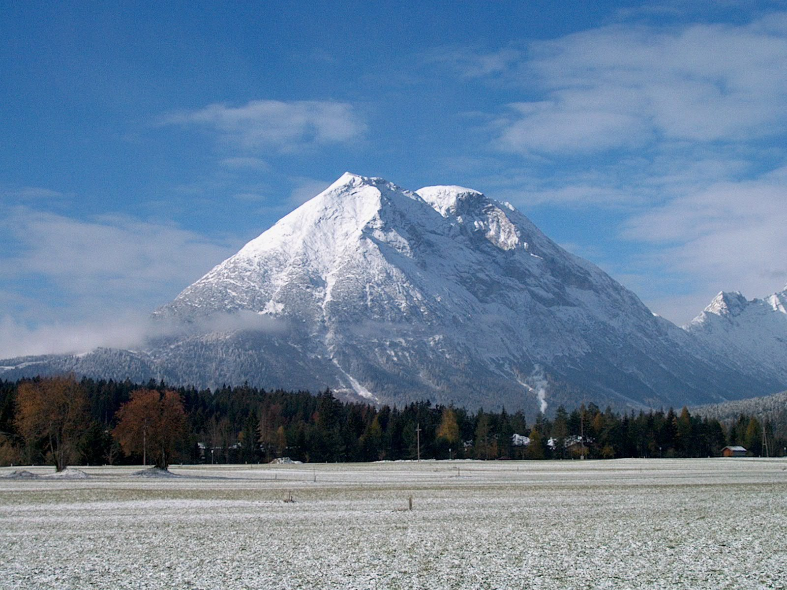 Leutaschtal und Hohe Munde, rechts Eingang in das Gaistal